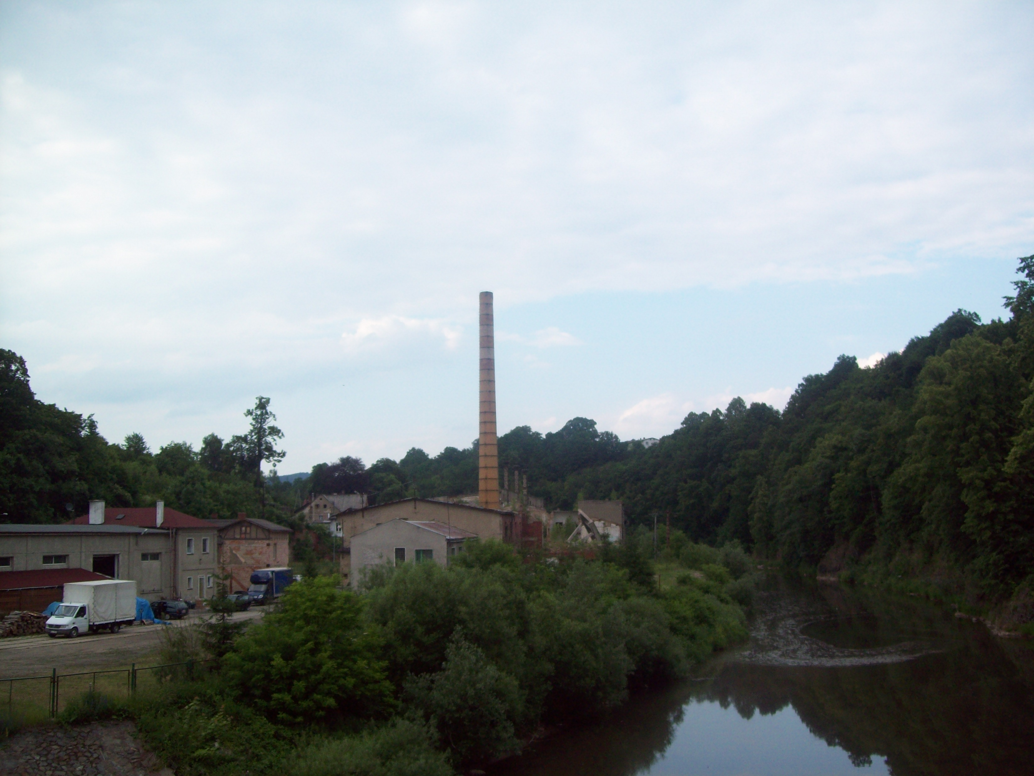 Widok na Młynów od strony Ławicy